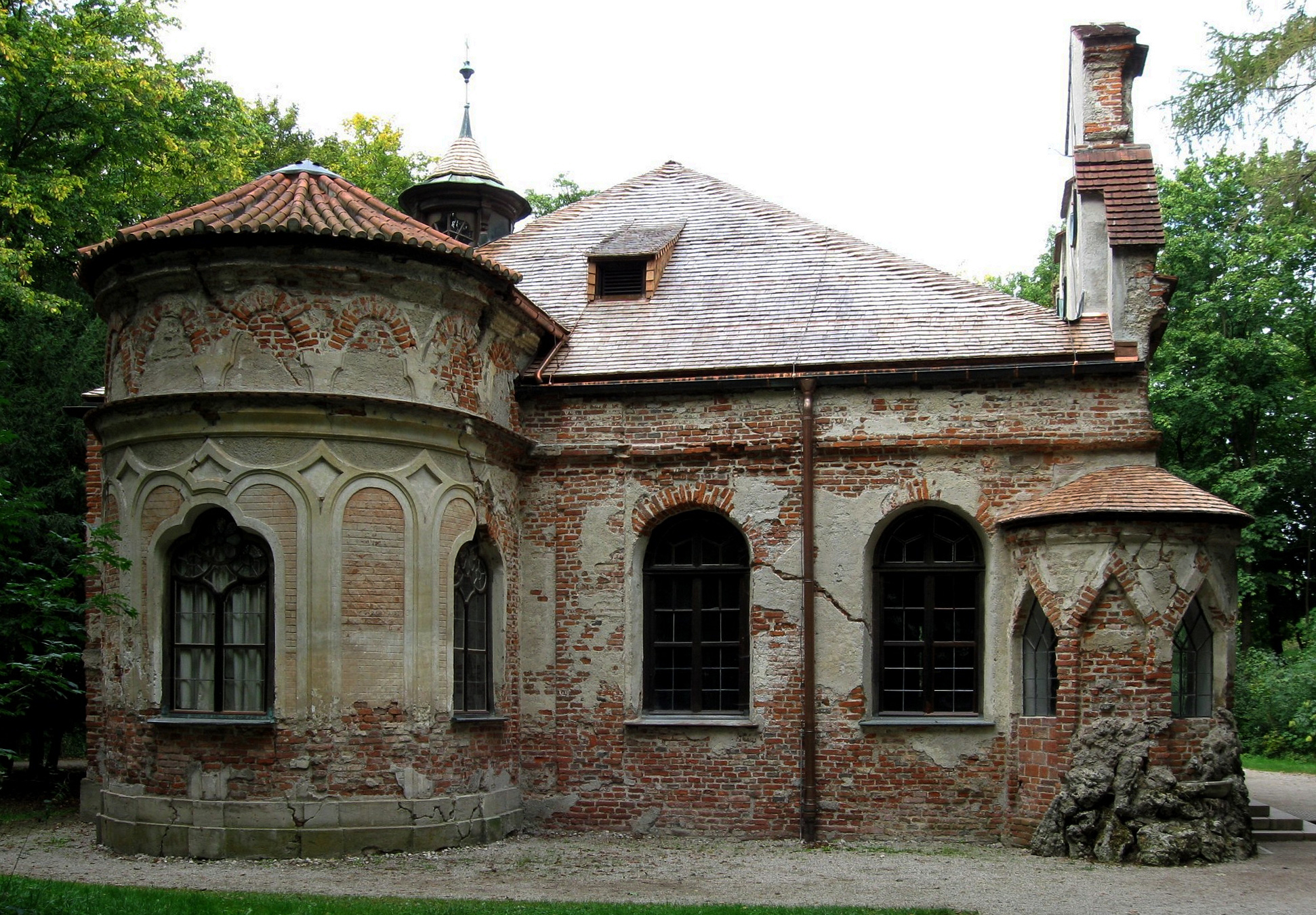 Magdalenenklause im Schlosspark Nymphenburg von 1725/26